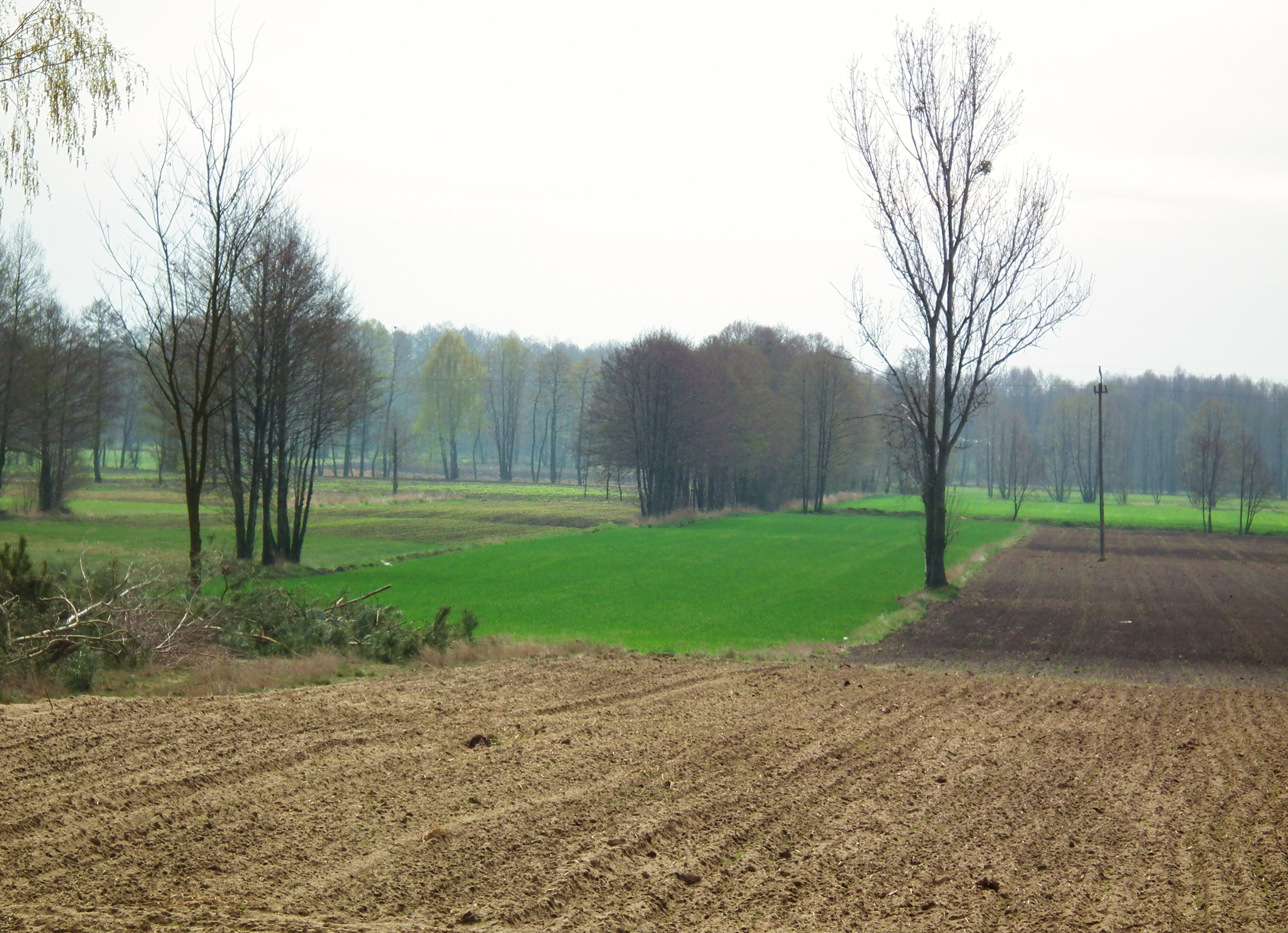 Okolice Koszelewskiej Łąki w Puszczy Pyzdrskiej.